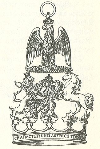 Scan van Blz. 591 van het boek "Handbuch der Ritter- und Verdienstorden " uitgegeven 1893 door Weber.Tekening van de in 1902 overleden Maximilian Gritzner. Robert Prummel 10 jul 2008 16:40 (CEST)